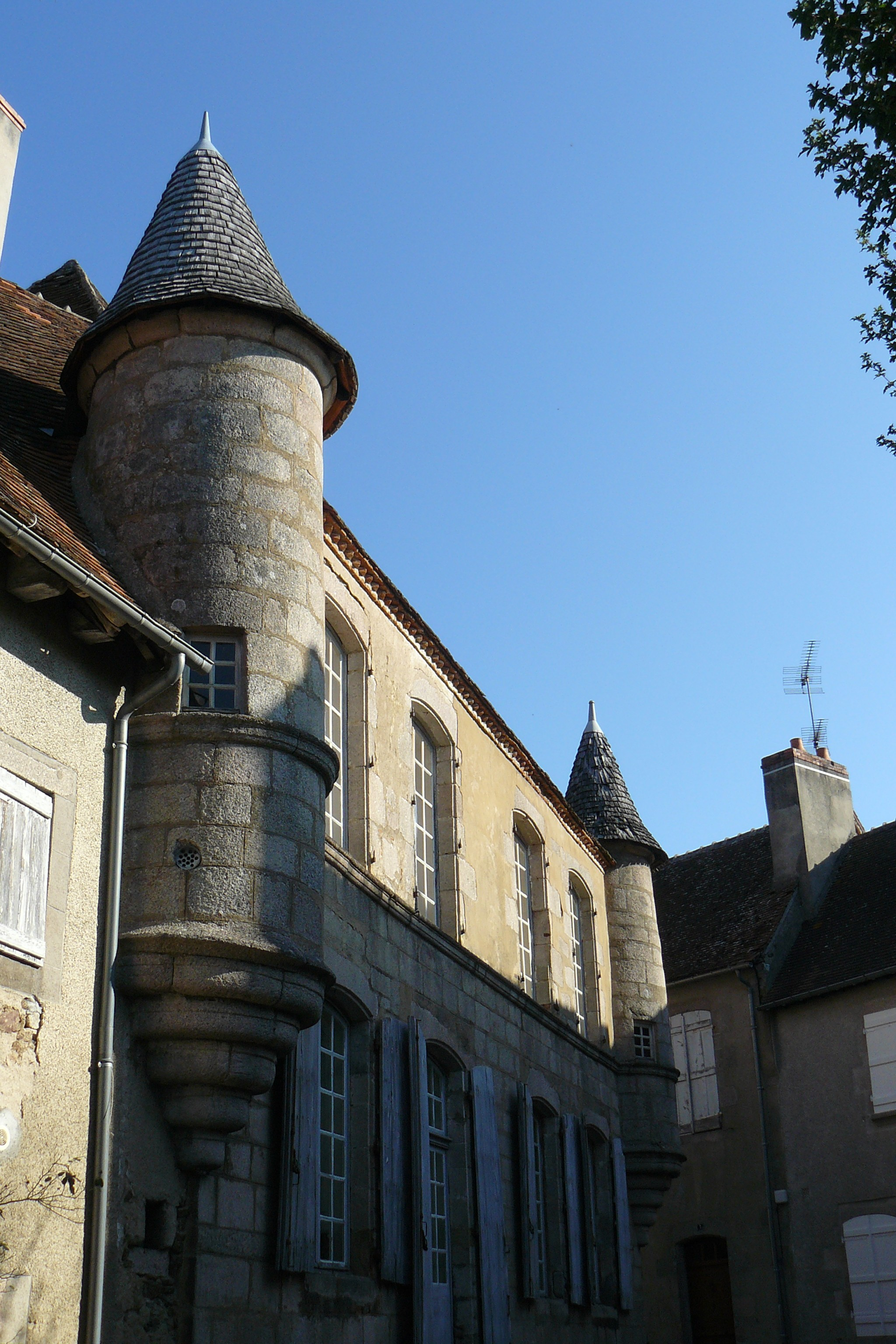 Boussac (Creuse, France) : maison à tourelle.